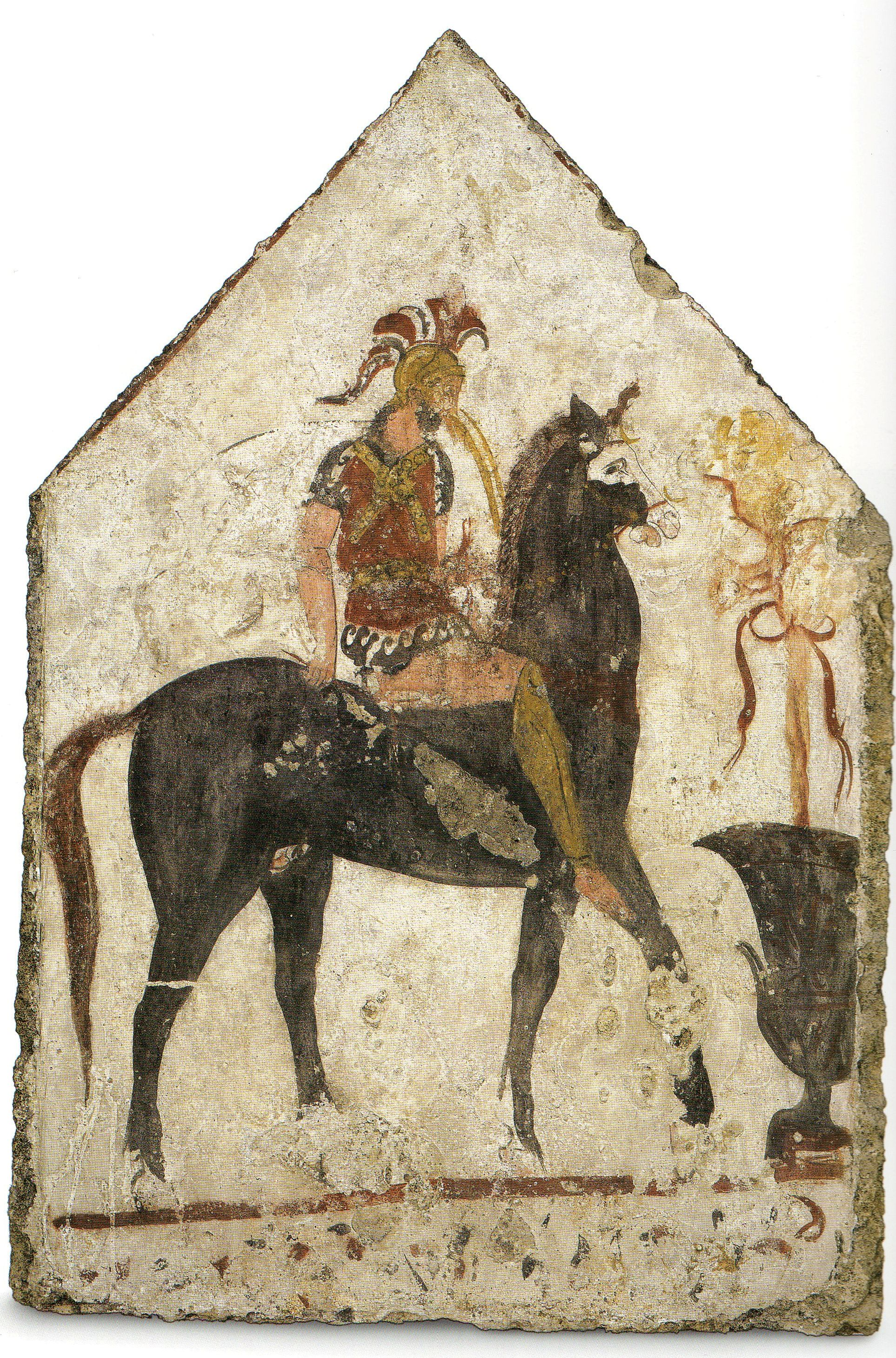 Paestum, Grab des schwarzen Ritters. Heimkehrender Ritter